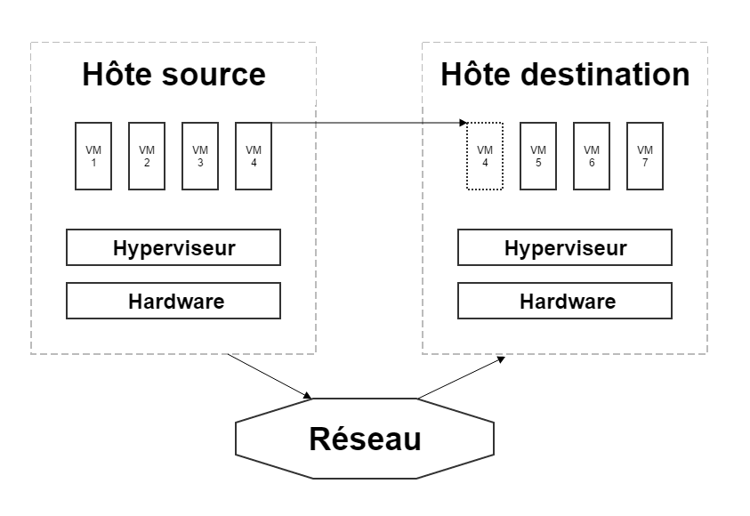 Schéma simpliste représentant la migration d'une machine virtuelle d'un hôte source à un hôte destinataire